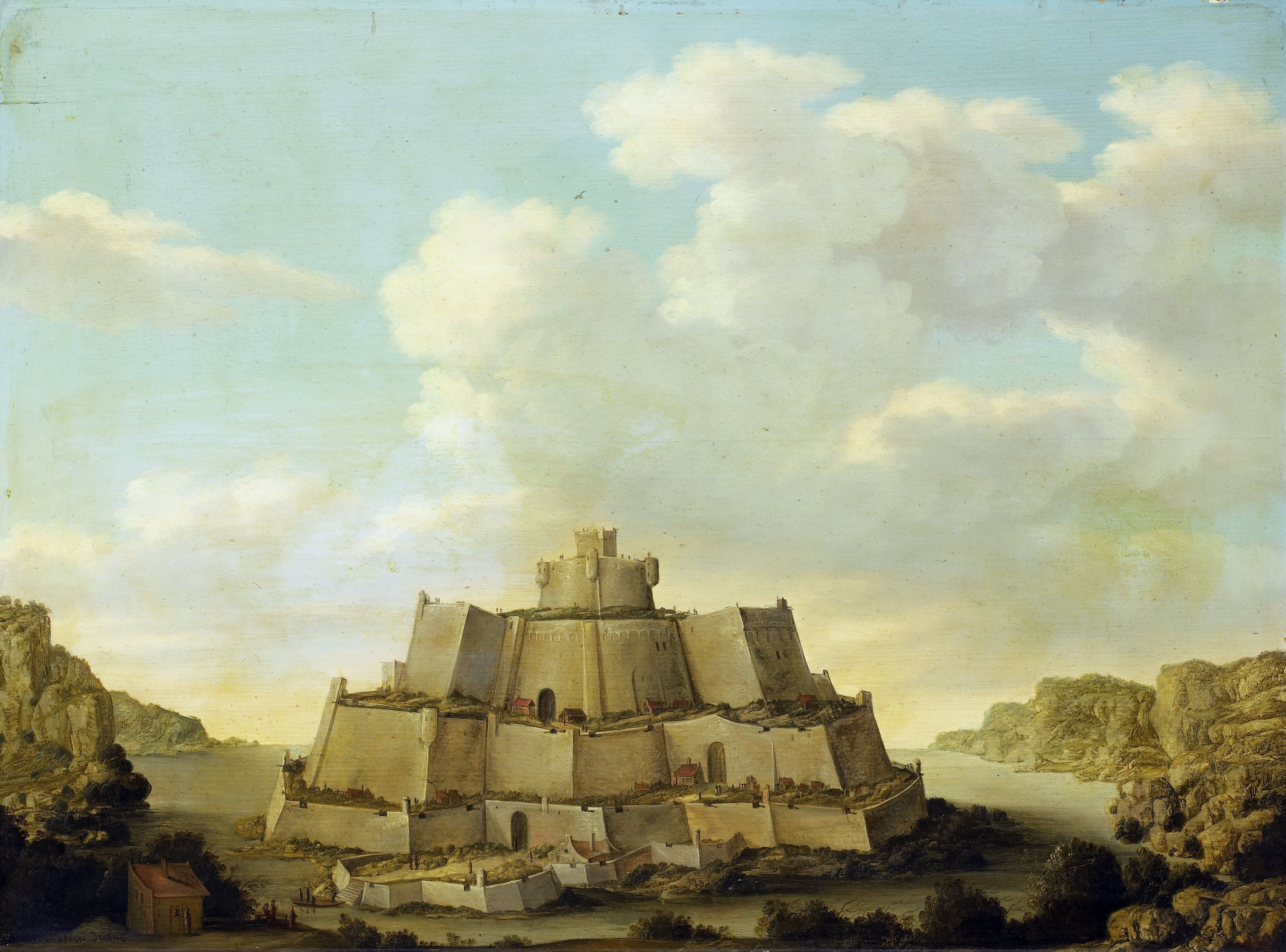 Een fort. Kustlandschap met een vesting op een eiland.